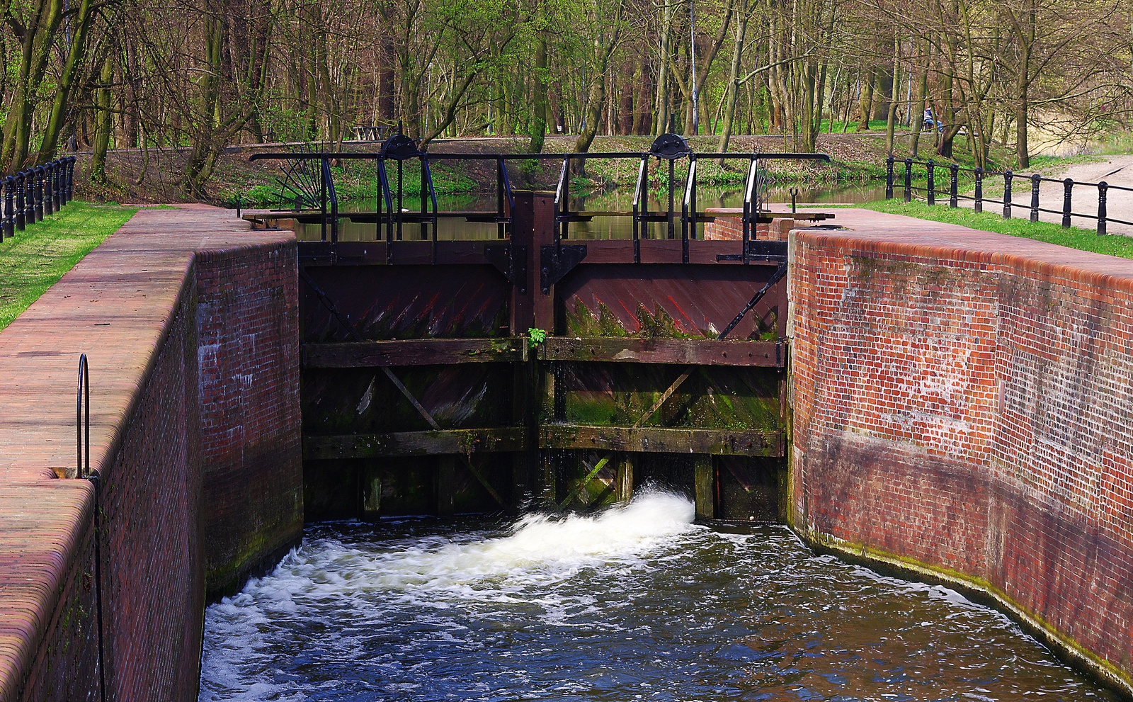 zespół Kanału Bydgoskiego (Starego i Nowego), 1773-1774, 1908-1815: szlak wodny z urządzeniami hydrotechnicznymi (9 śluz, 1 jaz) 6 budynków maszynowni 2 budynki sterowni 3 budynki obsługi 5 budynków mieszkalnych („dom śluzowego”) Bydgoszcz - Kanał Bydgoski, miasto Bydgoszcz